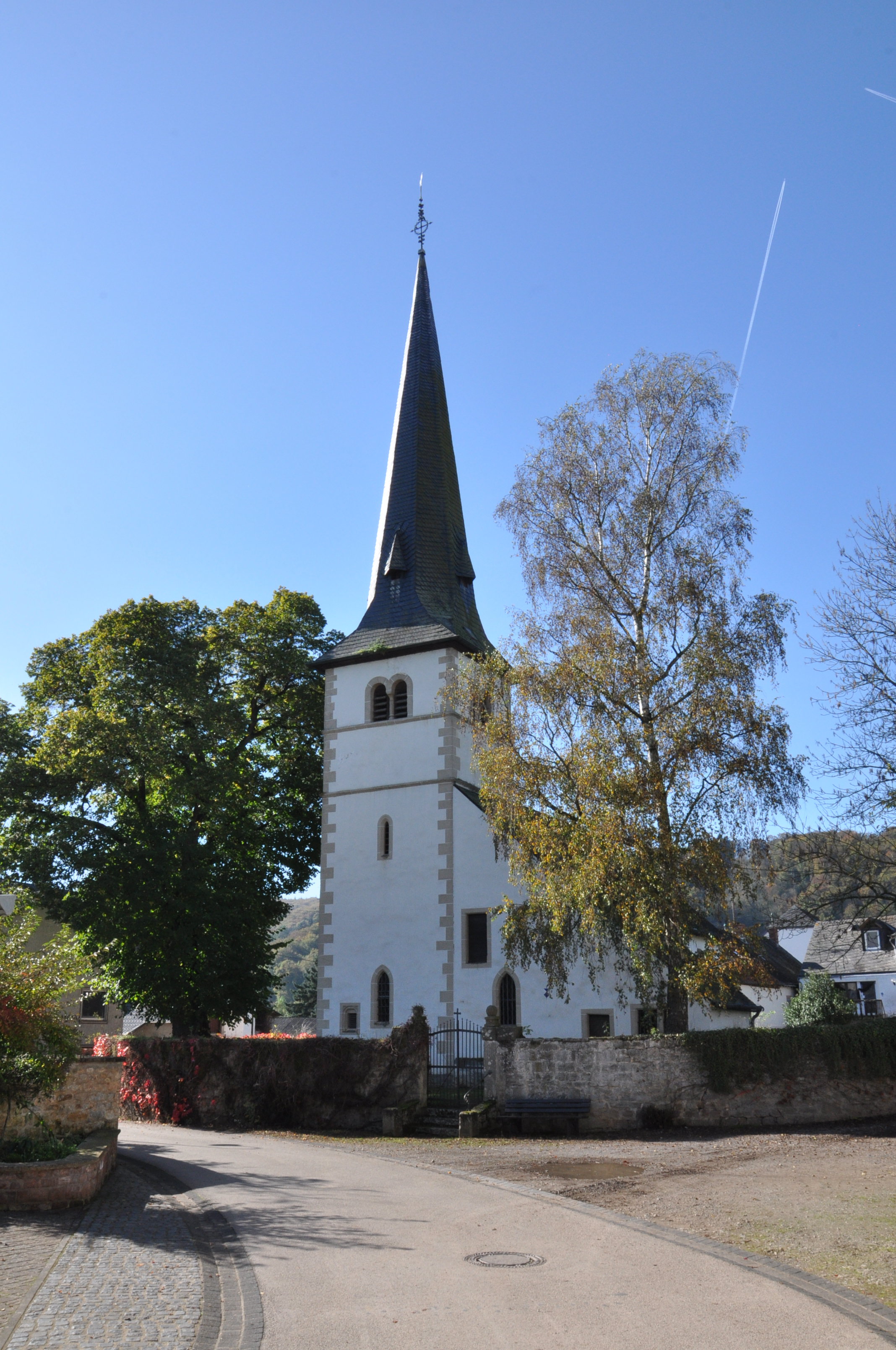 Wolsfeld, Alte kath. Pfarrkirche St. Hubertus